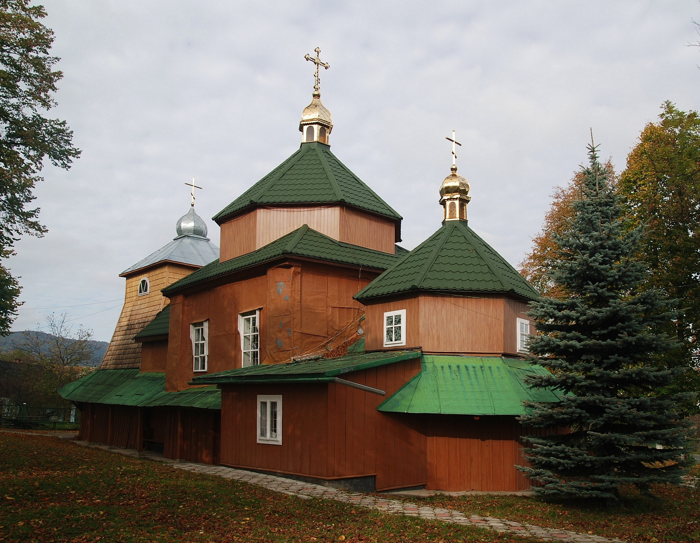 Церква Воскресіння Господнього (дер.), смт.Стара Сіль